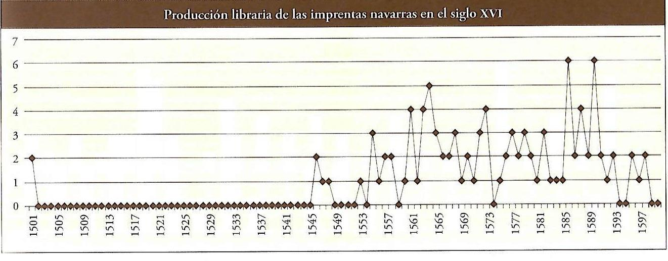 Producción de libros de las imprentas navarras en el siglo XVI